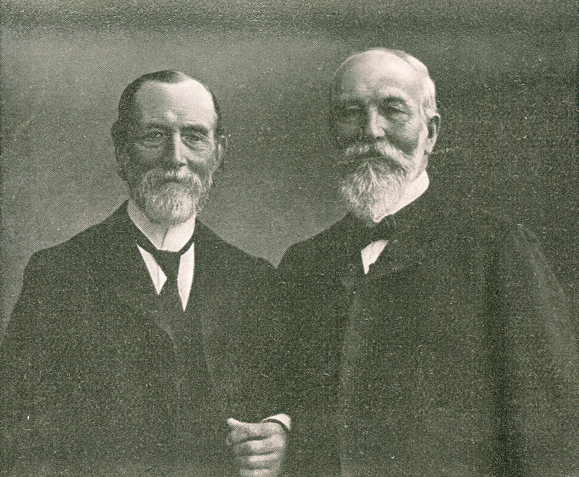 Die beiden Brüder Carl und Ferdinand Hauers (der Ältere), hier im Alter von rund 80 Lebensjahren, hatten unter anderem im Jahr 1853 in Hannover die Betten- und Waschefabrik Gebrüder Hauers gegründet, für die sie die Gebäude in der Schmiedestraße 30 erworben hatten. Die Brüder gründeten 1871 auch die Hannoversche Kunstziegelei C. & F. Hauers am Bahnhof Wülfel ...